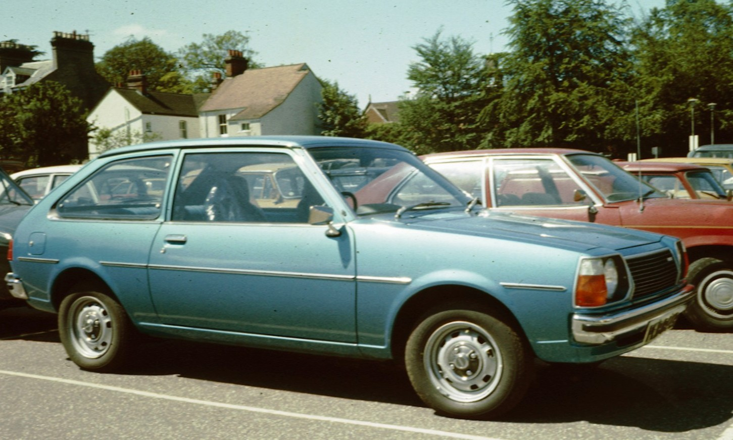 Mazda 323 1980 3 door